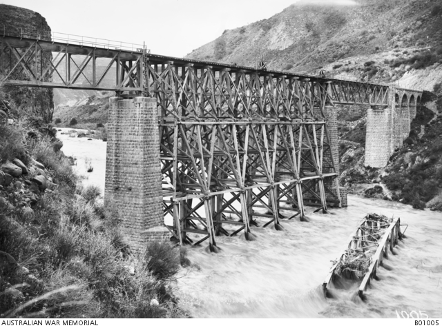 גשר הרכבת מעל הירמוך. בתחתית הערוץ שרידי גשר שפורק